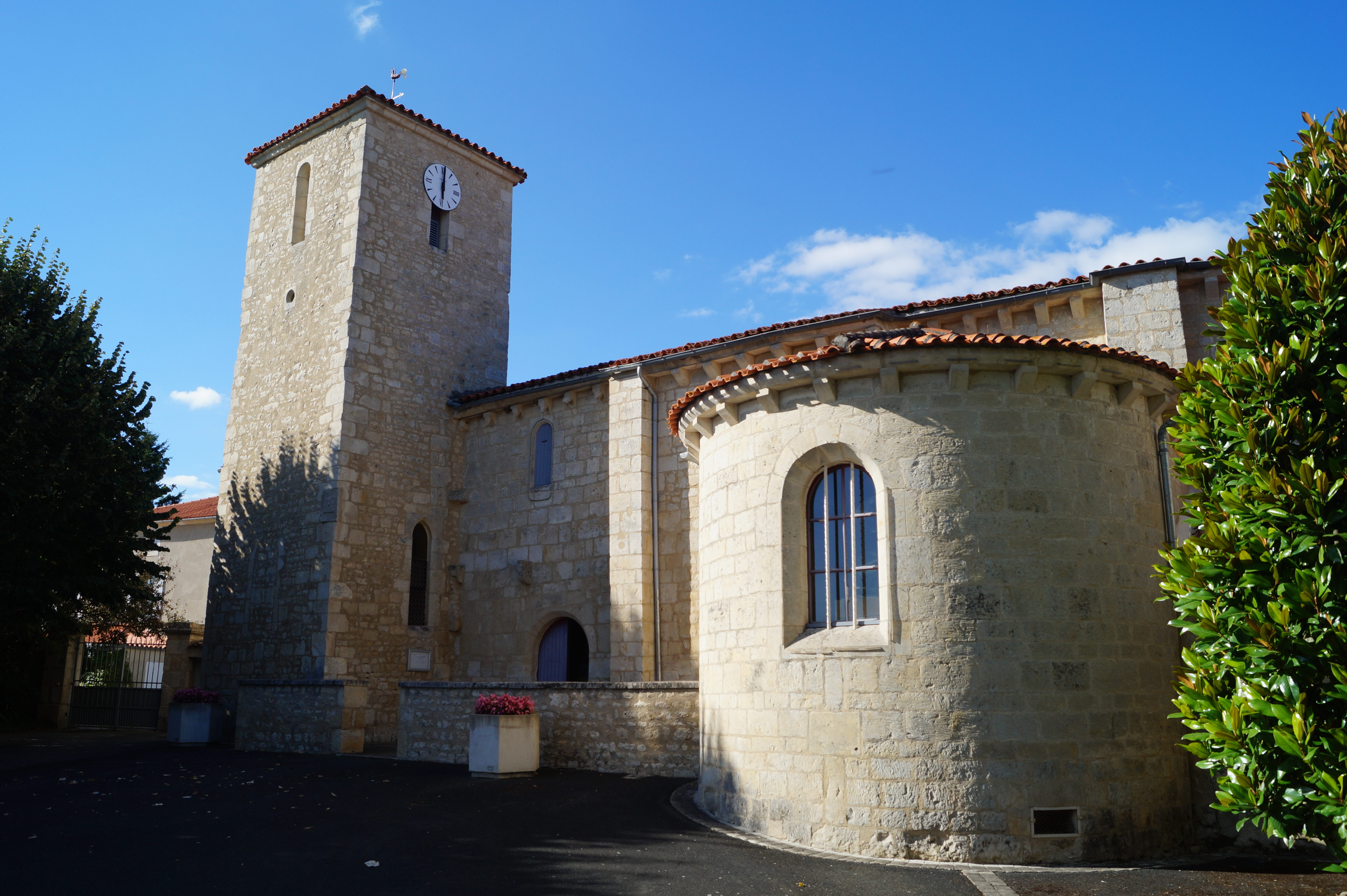 L’église Saint-Étienne de Chaix.